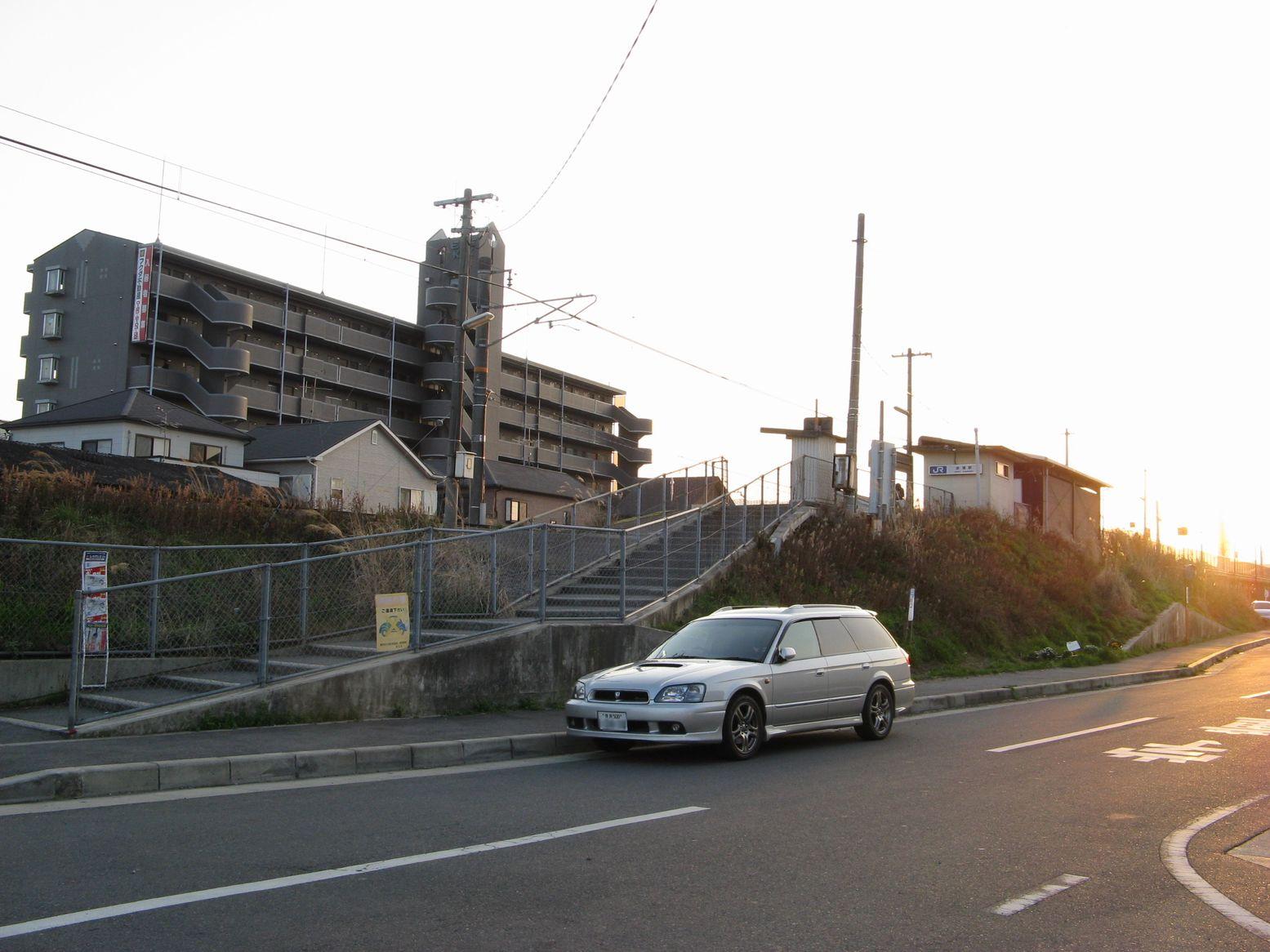 桜井線金橋駅